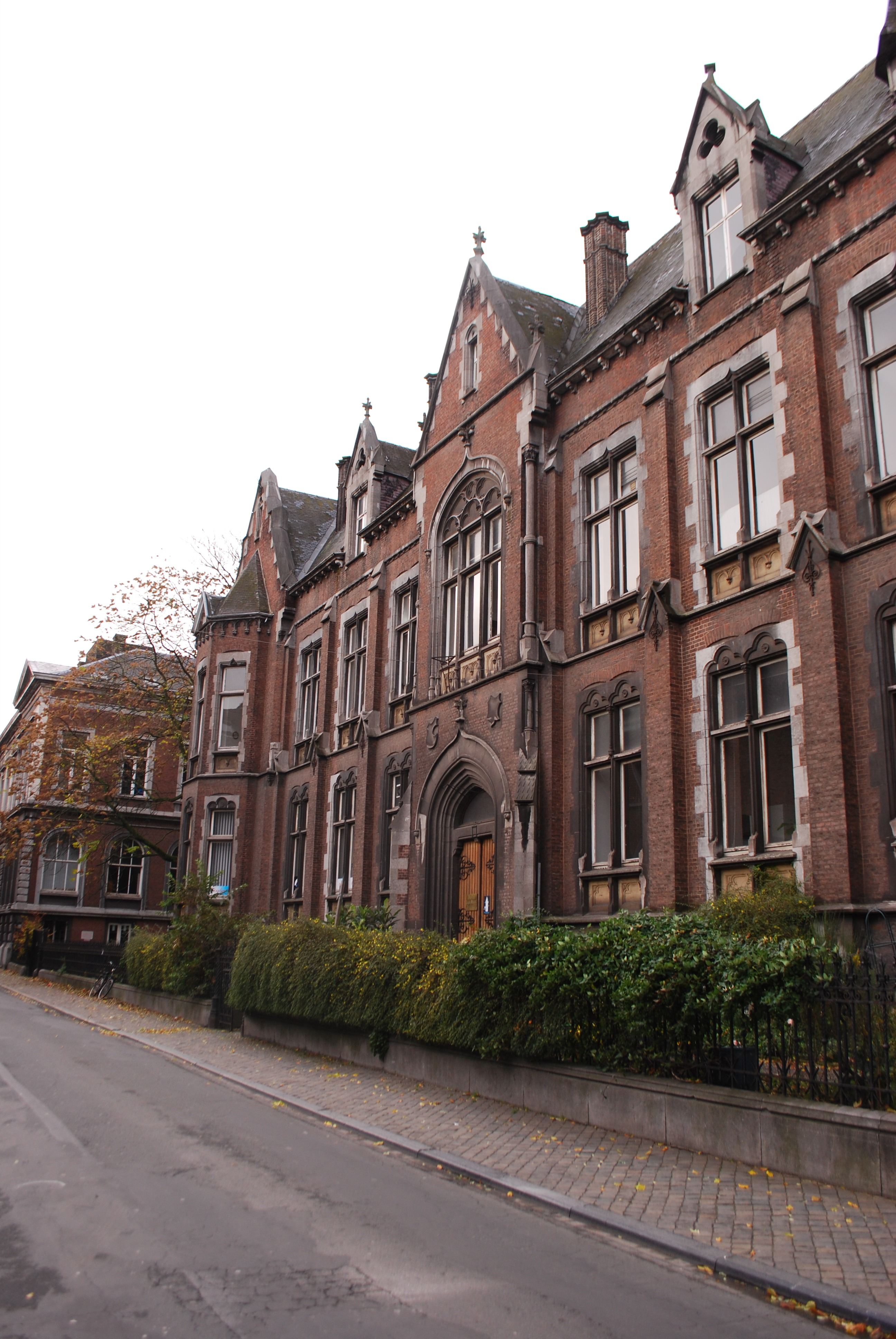 La rue de Pitteurs, à Liège : ancien institut d'anatomie de l'Université de Liège.